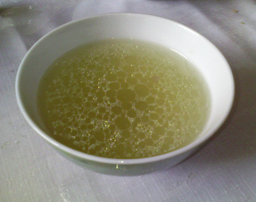 Шорпо - белый бульон к бешбармаку